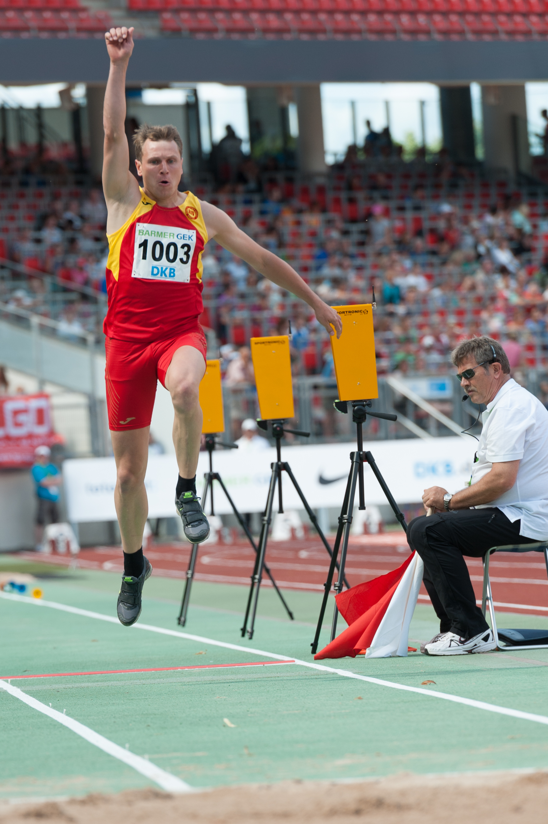 Deutsche Leichtathletik-Meisterschaften 2015: Männer Dreisprung - Andreas Pohle, ASV Erfurt